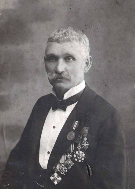 Karel Zdeněk Líman (1855 - 1929), Český architekt.